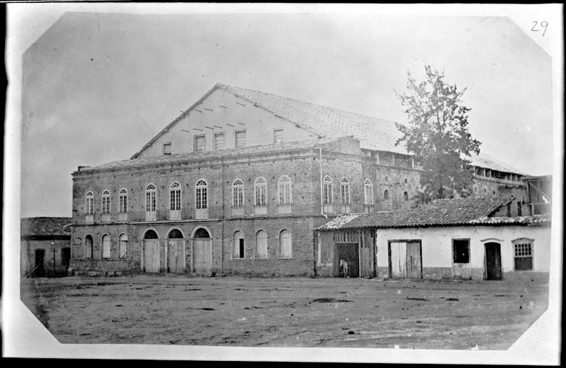 Obra que integra o acervo do Museu Paulista da USP. Coleção Militão Augusto de Azevedo.